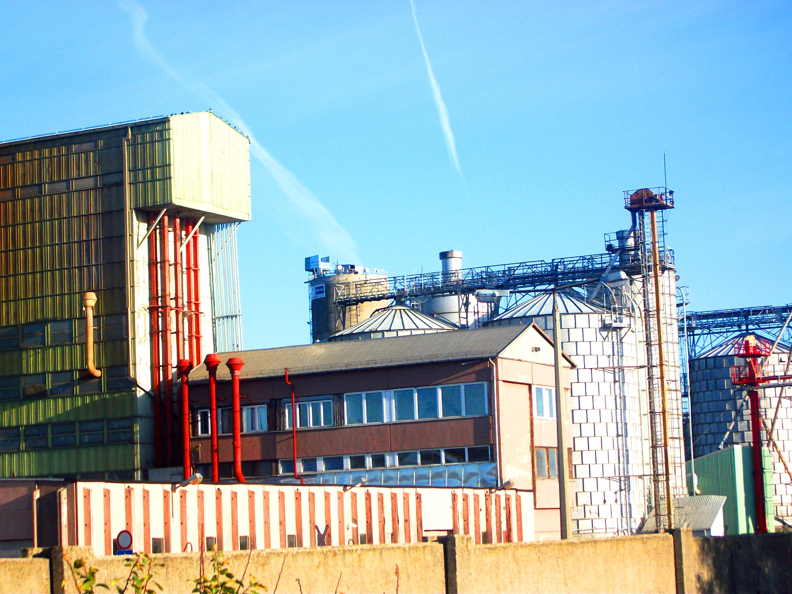 A Cargill cégcsoportba tartozó Provimi gyára Zichyújfaluban.